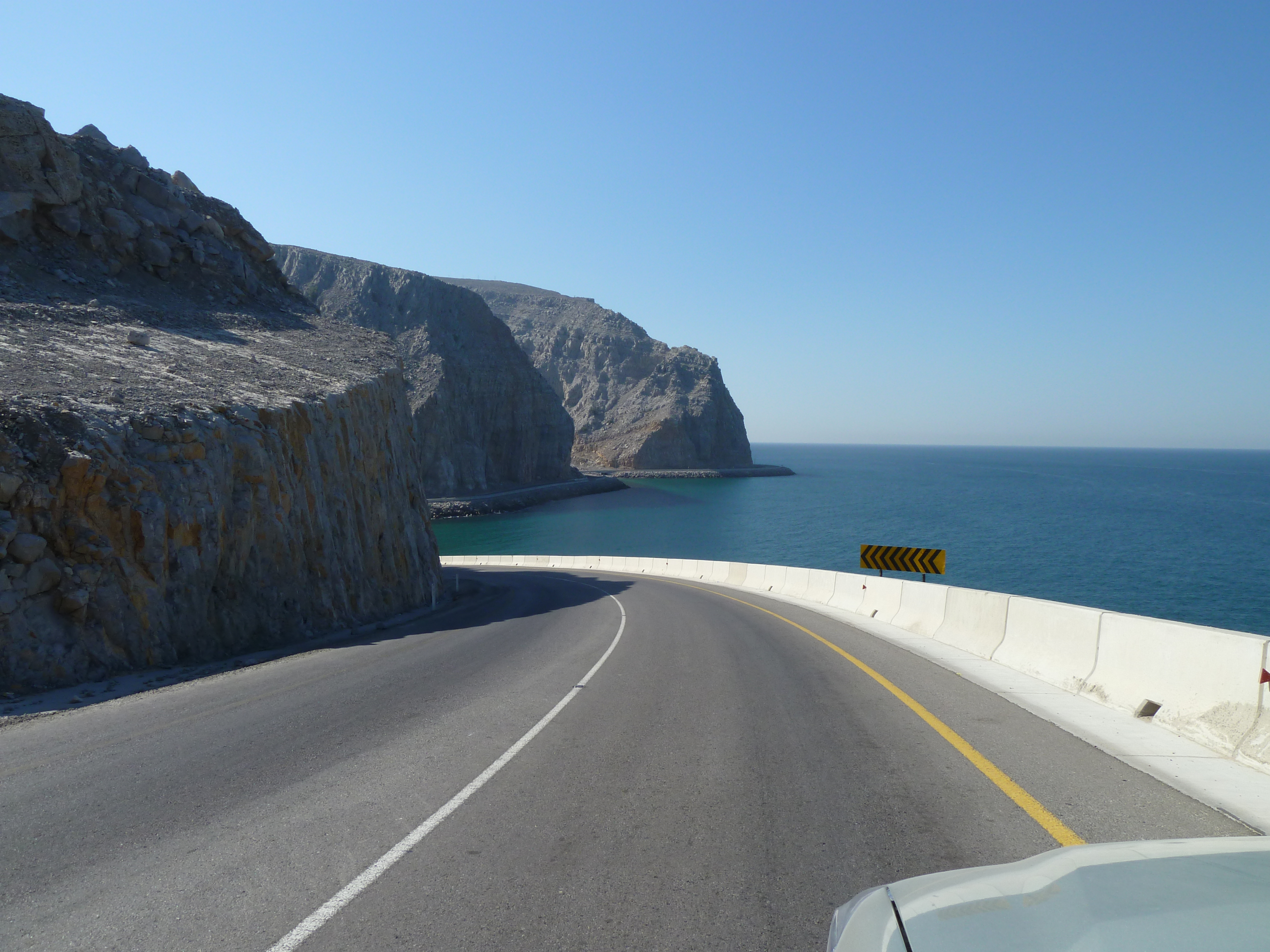 Khasab, Musandam, Oman